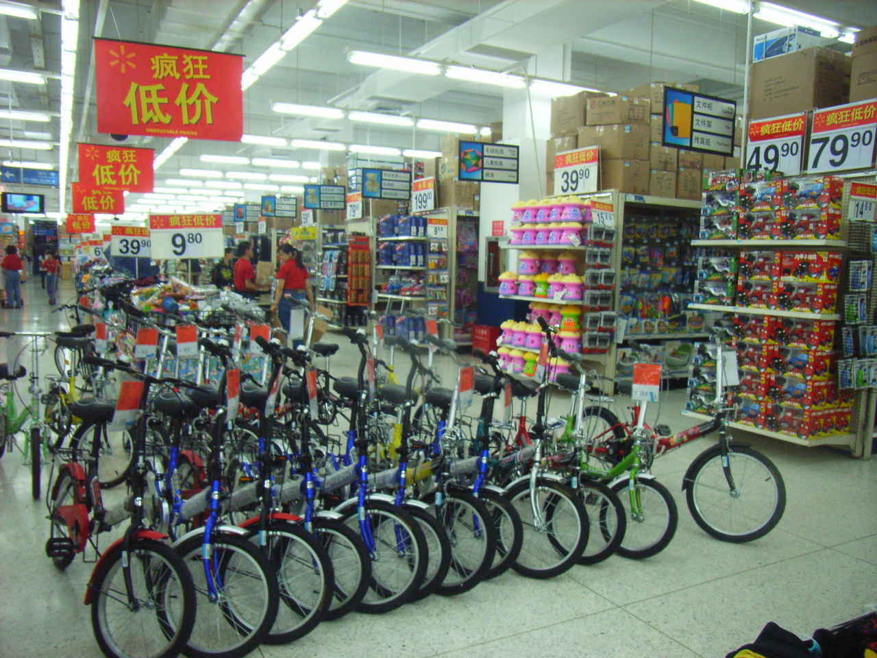 深圳華僑城沃爾瑪百貨商場